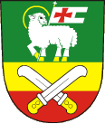 Znak obce Horní Nětčice